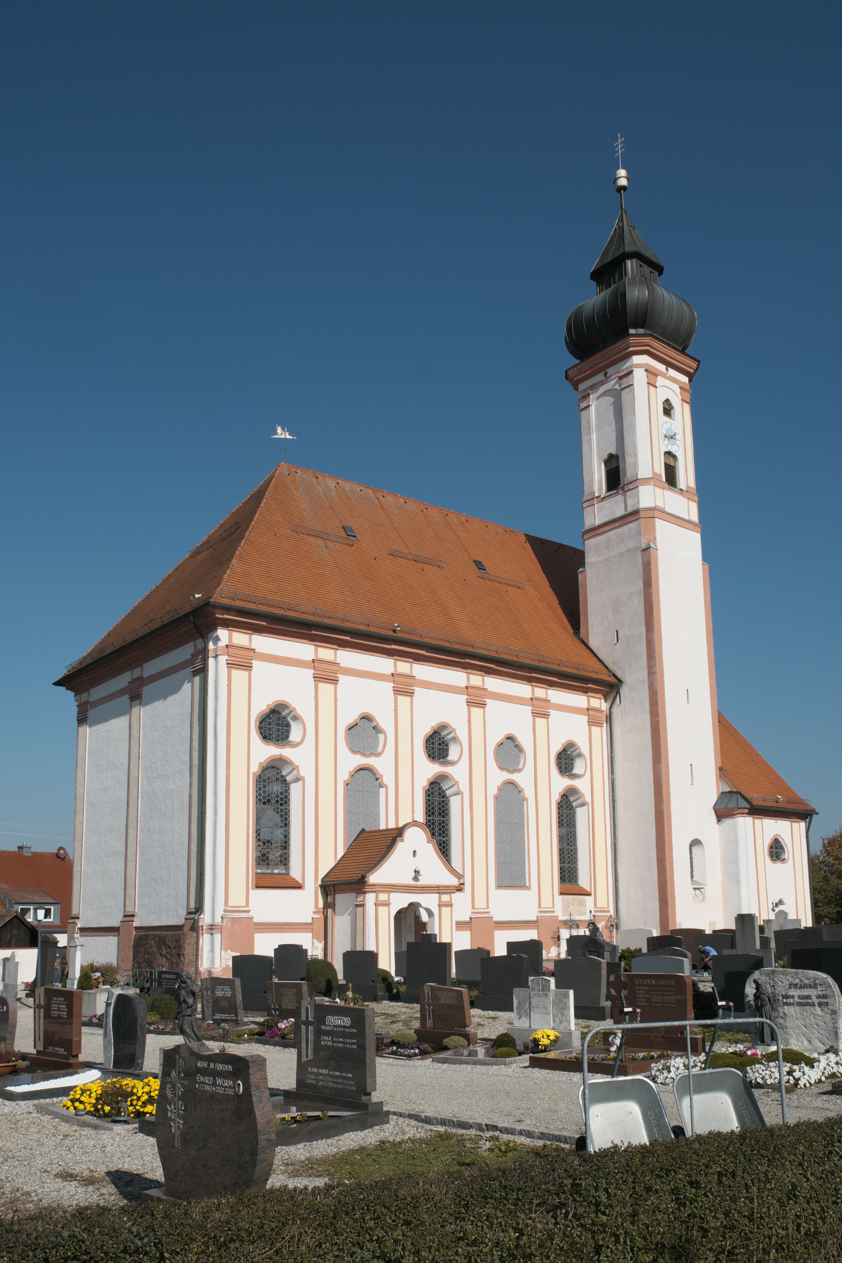 Katholische Pfarrkirche St. Jakobus in Vierkirchen im Landkreis Dachau (Bayern/Deutschland)